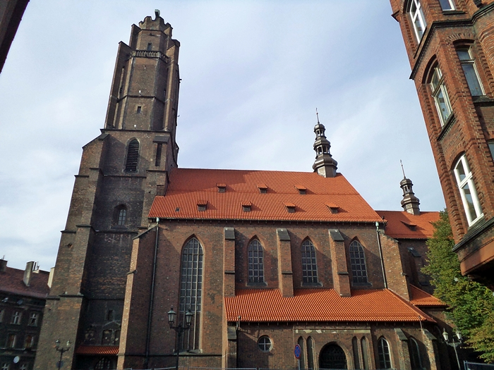 Gliwice, pl. Kościelny - kościół parafialny pw. Wszystkich Świętych (zabytek nr A/327/60)